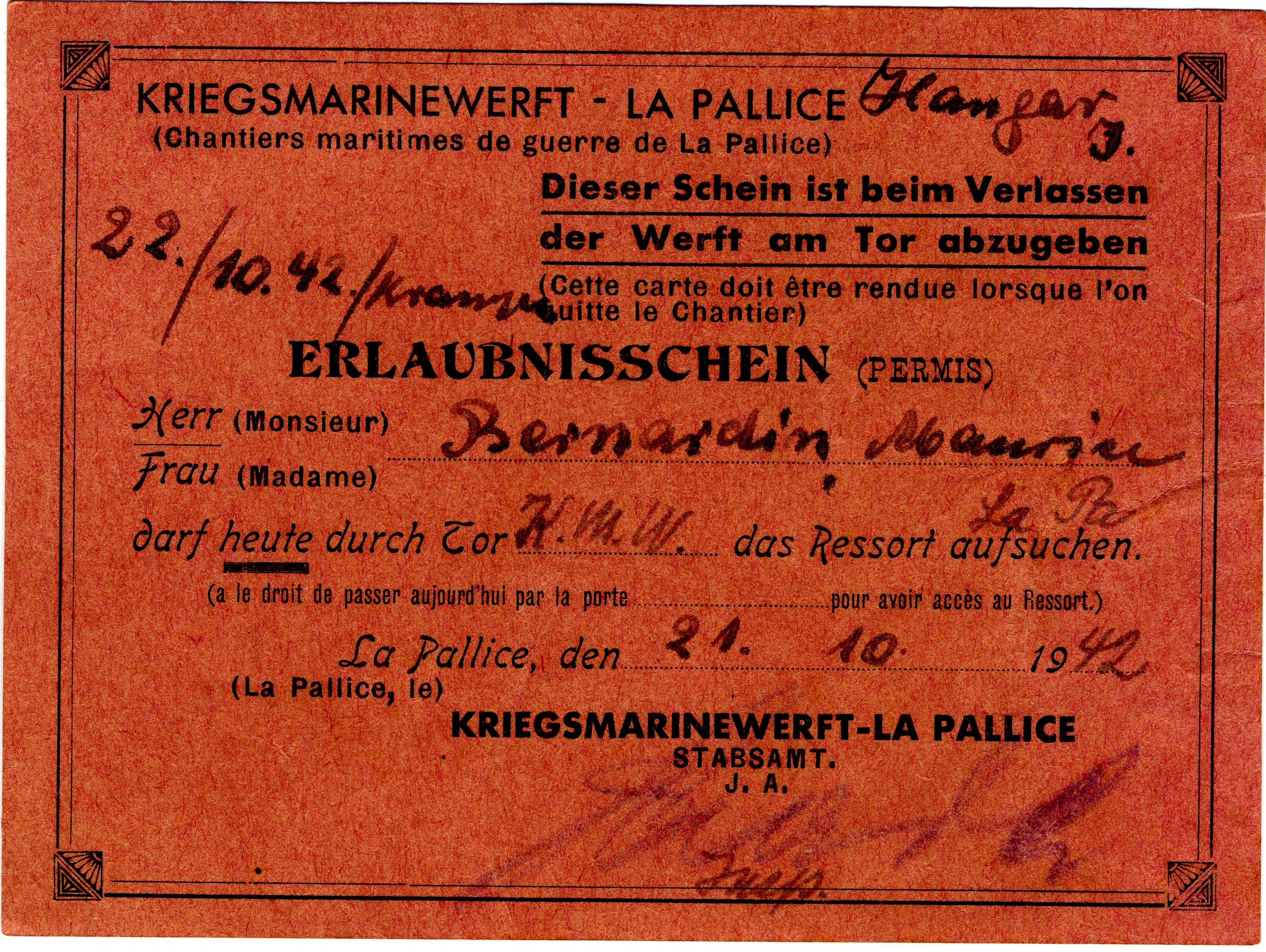 Un permis d'accès journalier aux chantiers maritimes de guerre de La Pallice (Kriegsmarinewerft - La Pallice) délivré le 21 octobre 1942 à Monsieur Maurice Bernardin durant la seconde guerre mondiale. La Rochelle-Pallice, 21 octobre 1942.